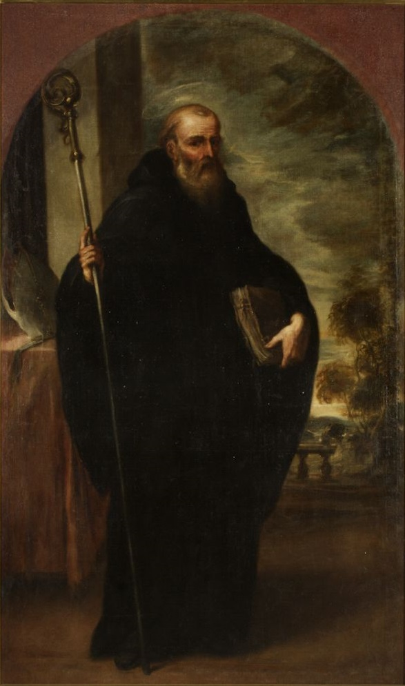 La obra representa a San Benito de Nursia, fundador de la Orden de los Benedictinos, y procede del monasterio de Veruela.